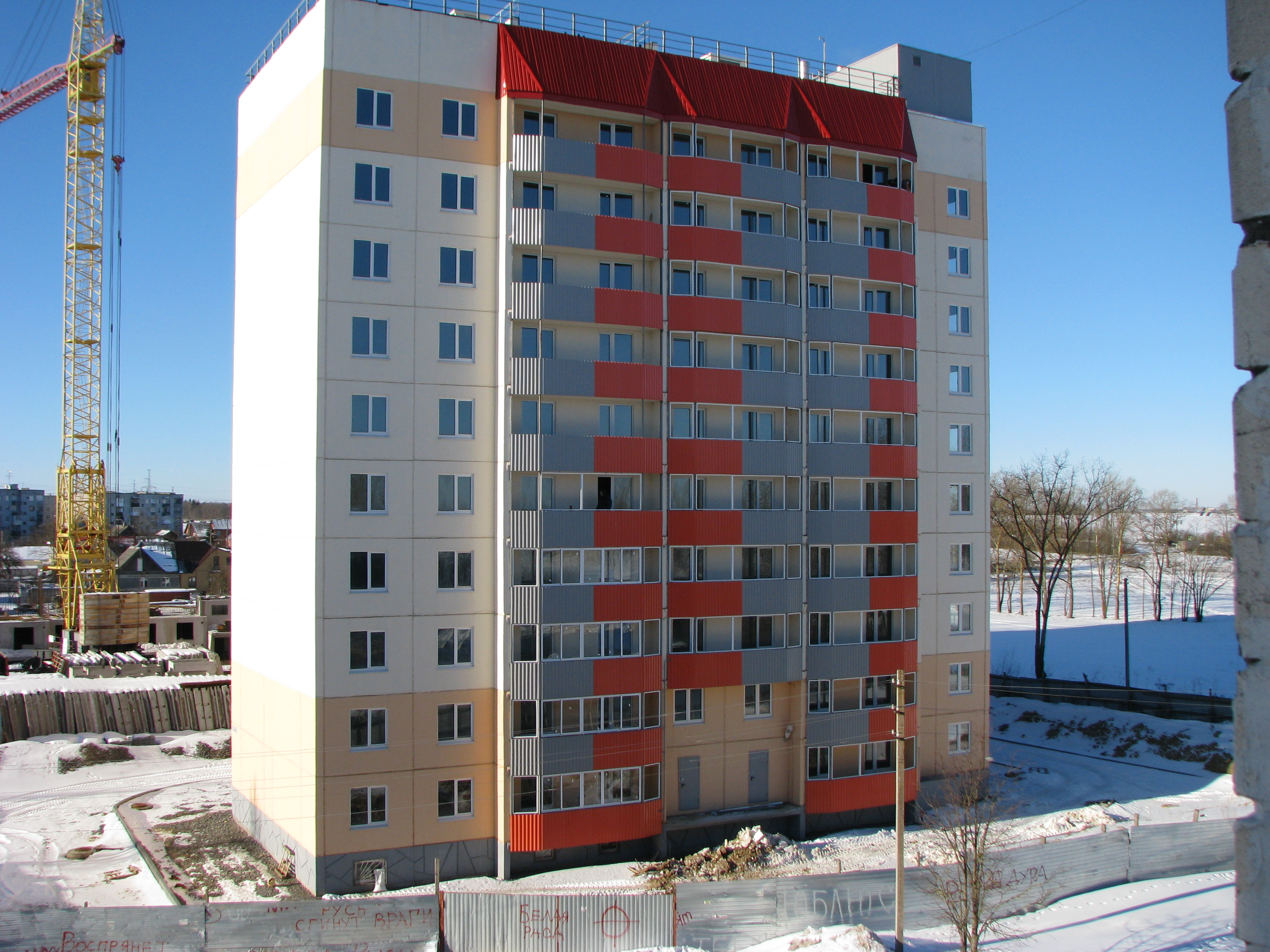 Lagolovo, Leningradskaya oblast', Russia